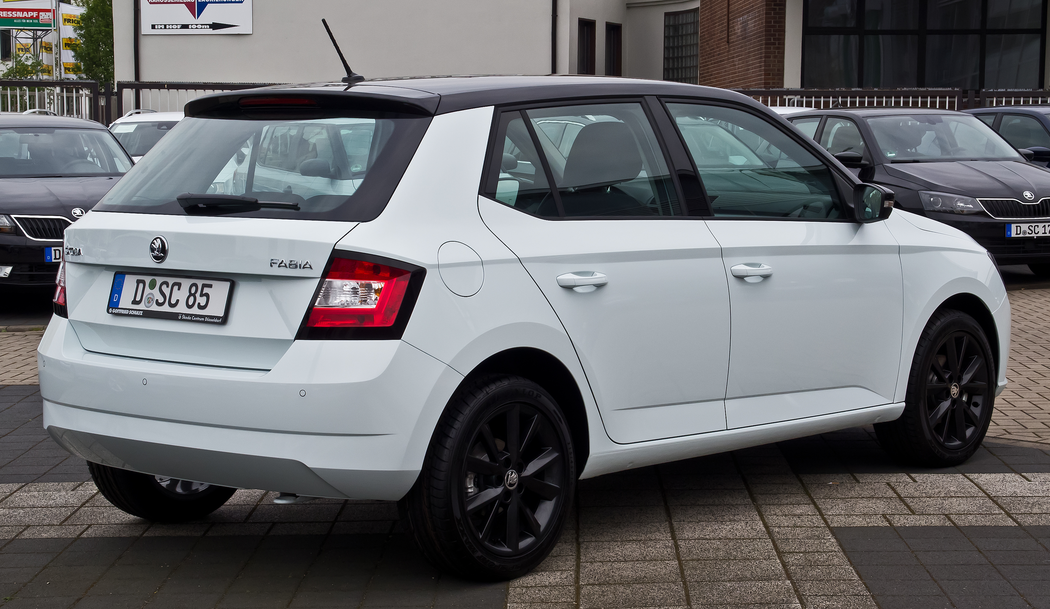 Skoda Fabia Style (III)